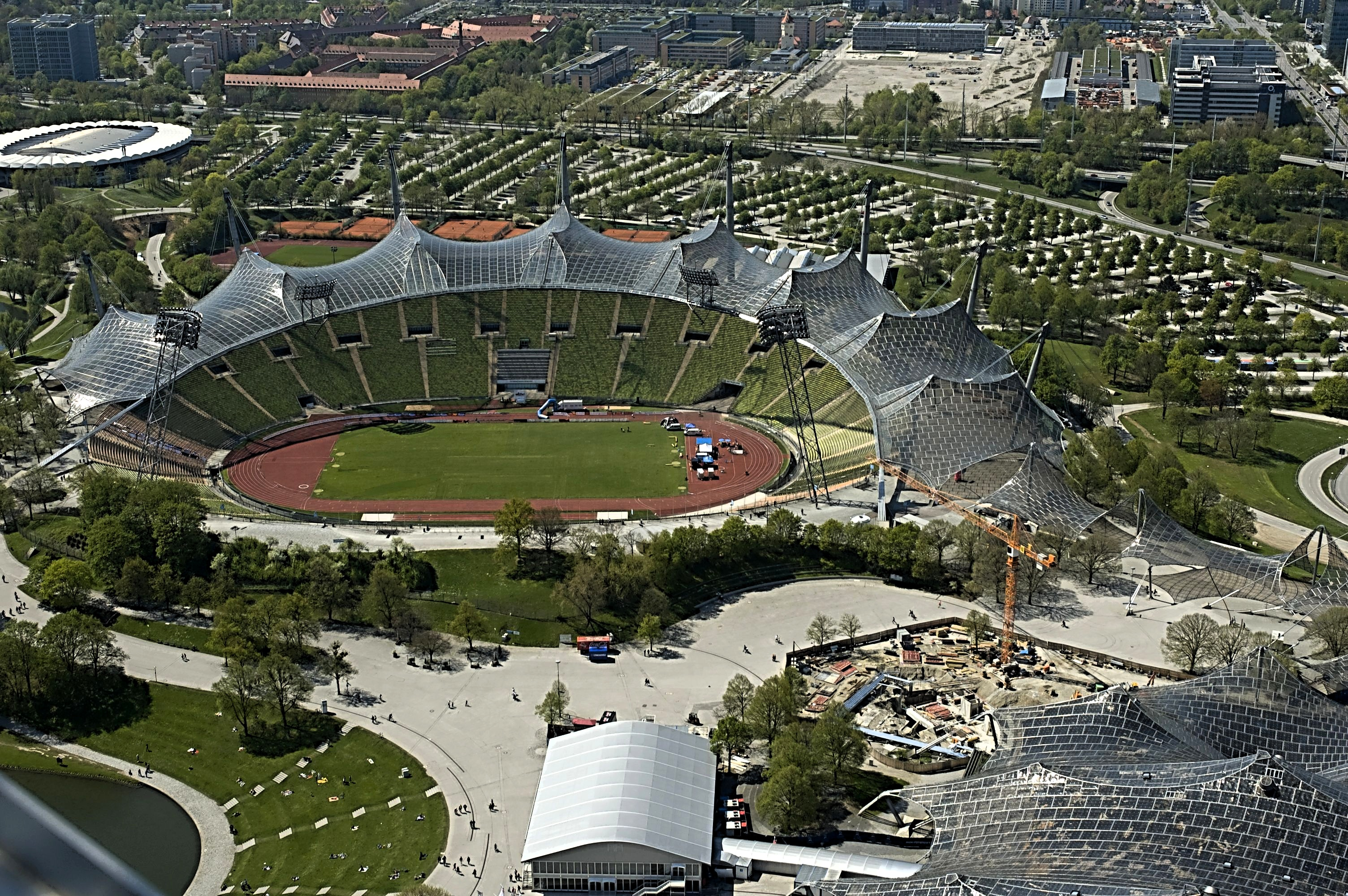 Das Olympiastadion in München. Blick vom Olympiaturm.